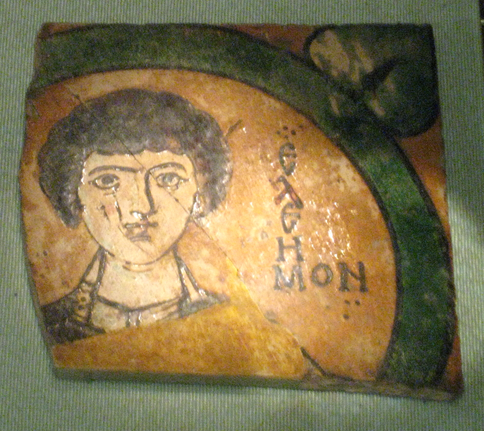 Керамическая икона "Св. Пантелеймон". Византия, 10-11 в. Глина, глазурь. Никомедия, катакомбы. ГИМ